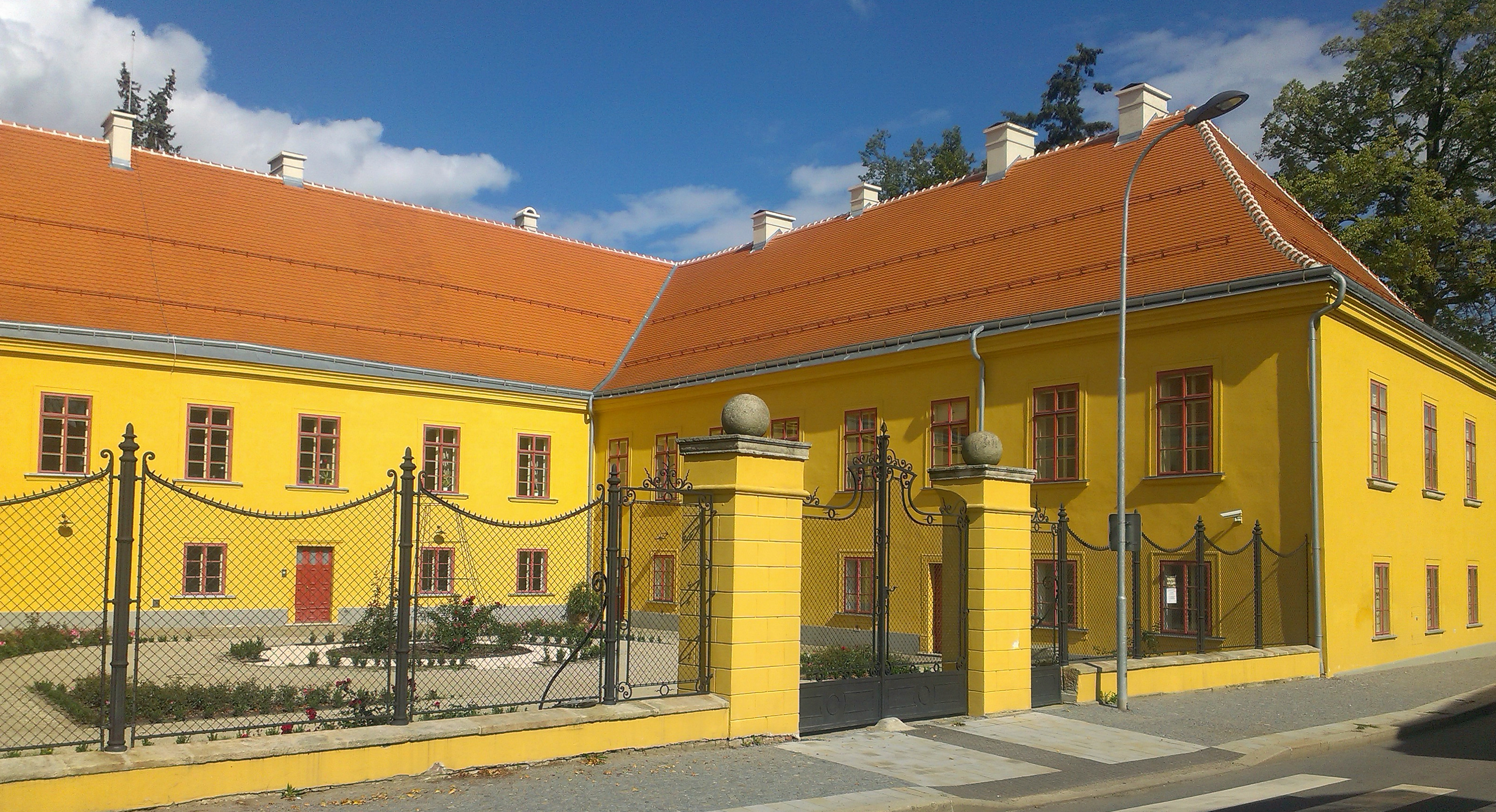 Jezuitská kolej, Hradecká 6 a 7, Telč-Staré Město, Telč.